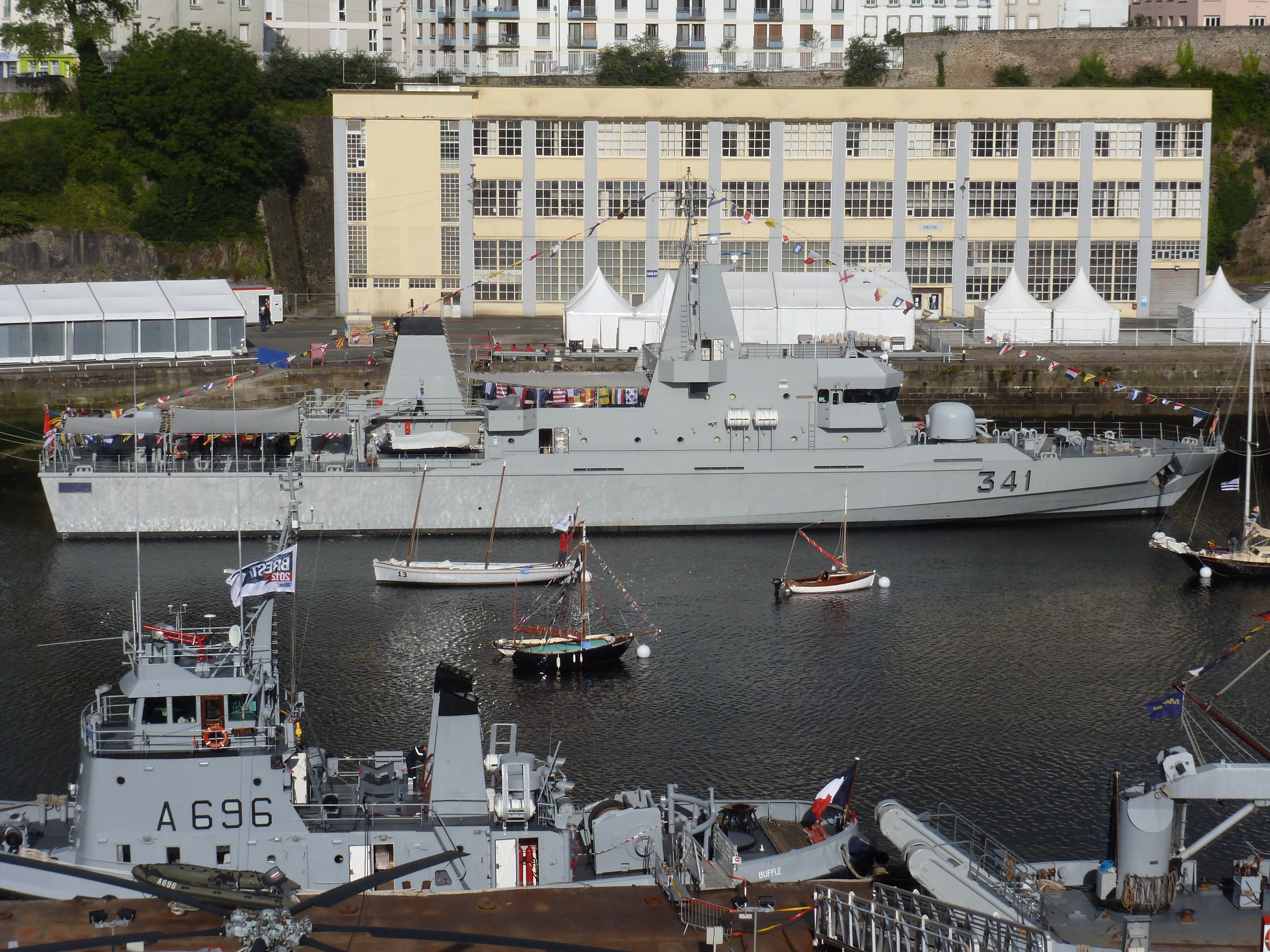 Le Buffle (au premier plan) et le Bir Anzaran (au second plan) à quai.